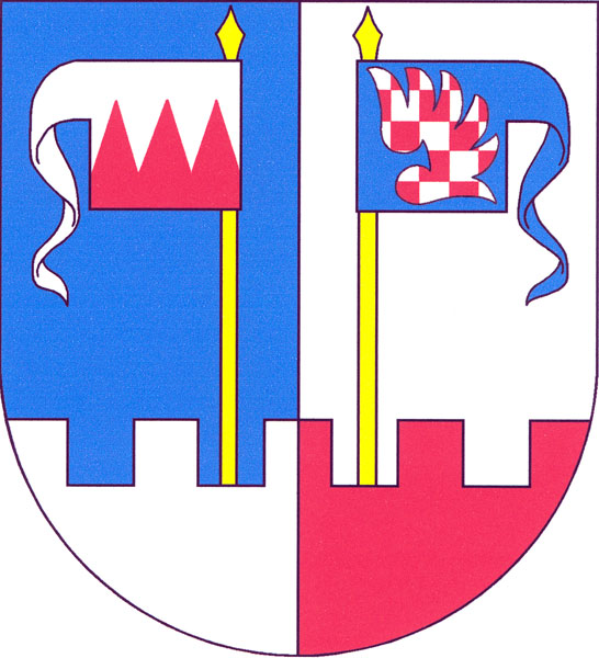 Znak obce Chotiměř